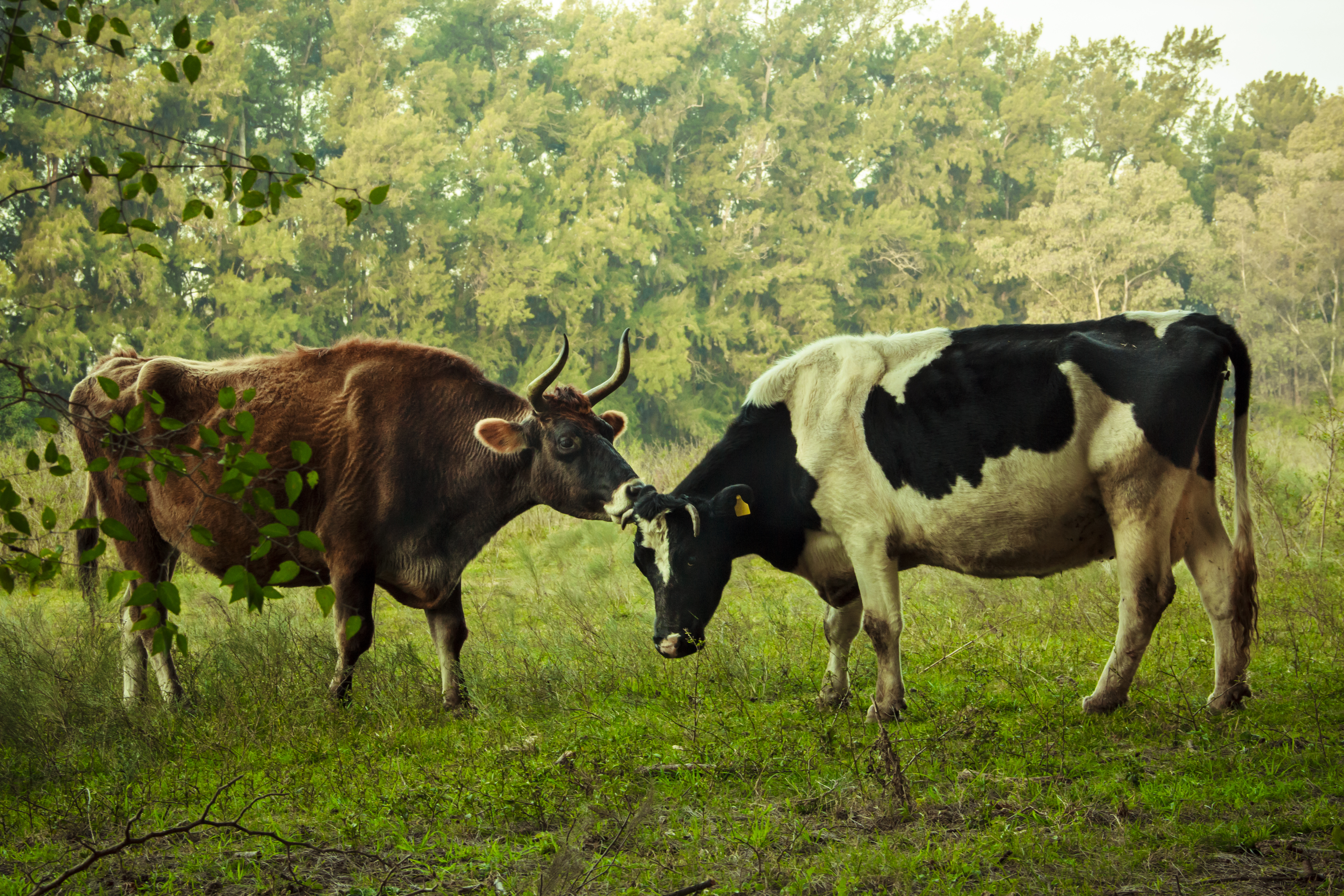 Santuario El Paraíso de los Animales